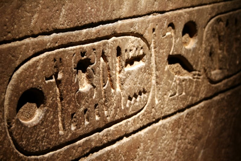 Cartiglio sulla statua colossale del faraone Seti II - Museo Egizio di Torino